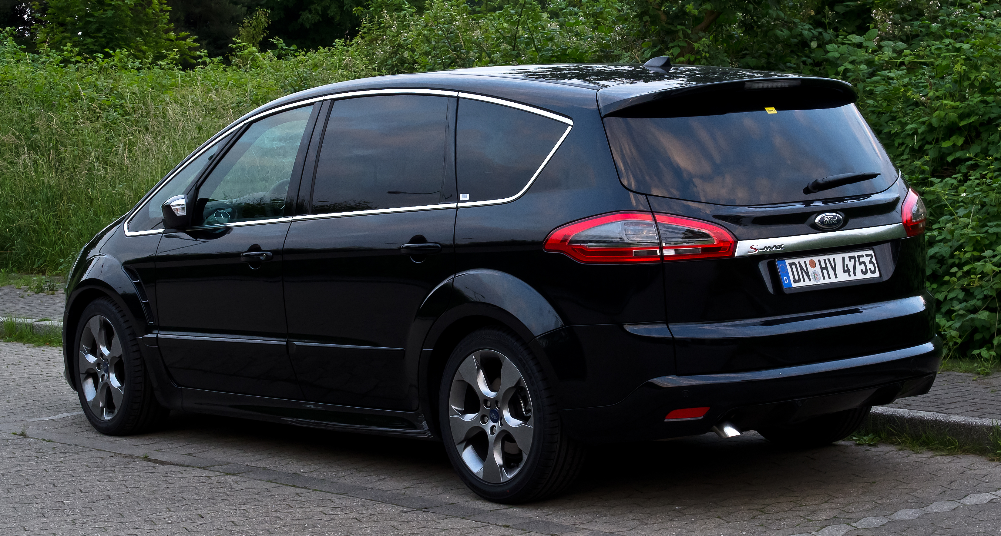 Ford S-Max Titanium S (Facelift)